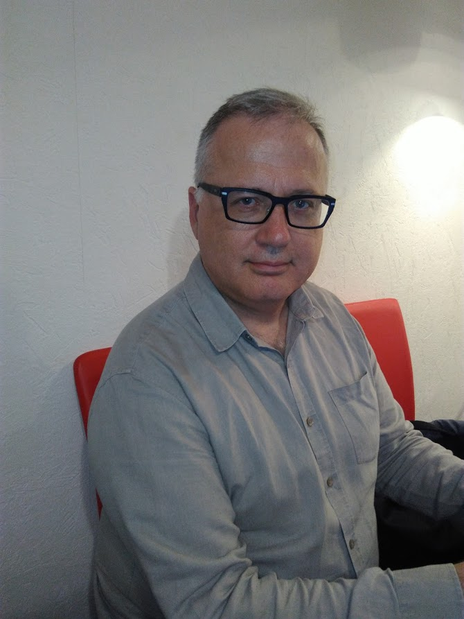 Retrach fotografic de Joan Francés Blanc